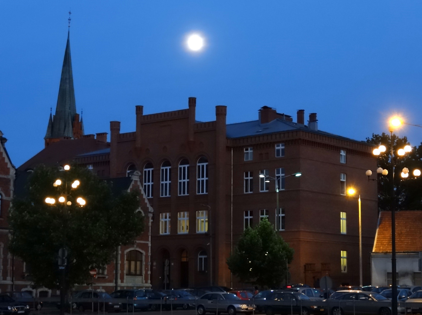 Budynek Seminarium Duchownego w Bydgoszczy, 1858 r.